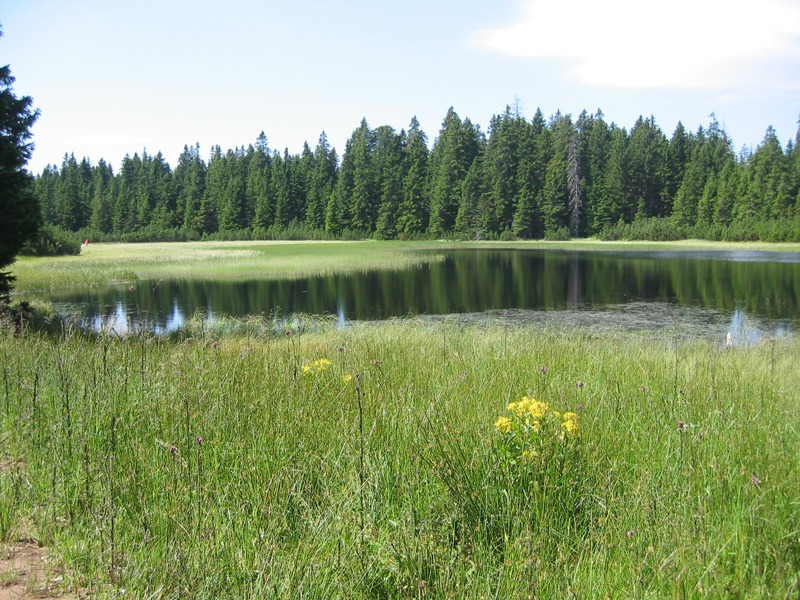 Črno_jezero_Pohorje, Pohorje, Slovenija Foto Andrejj, 2005